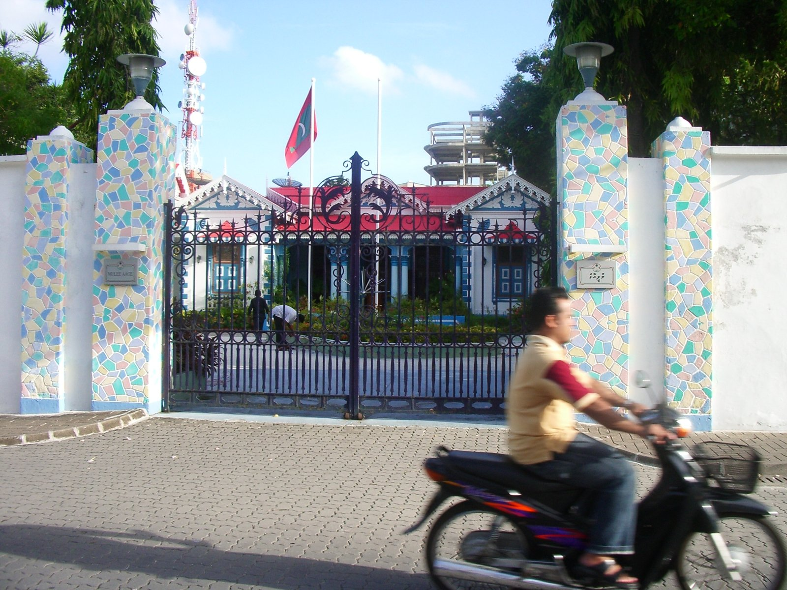 edifici del govern a Male; foto feta per J. Ollé el juliol del 2006.